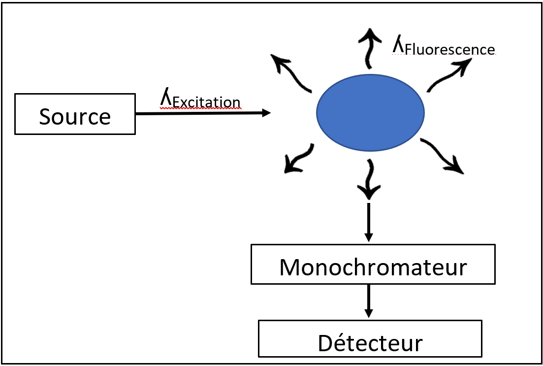 Lecture de la fluorescence d'un atome excité à 90 degré par rapport à la source d'énergie en spectroscopie de fluorescence.